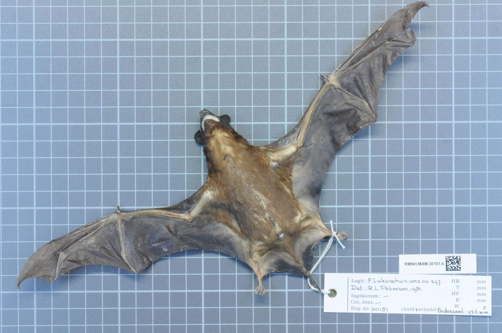 Cynomops abrasus